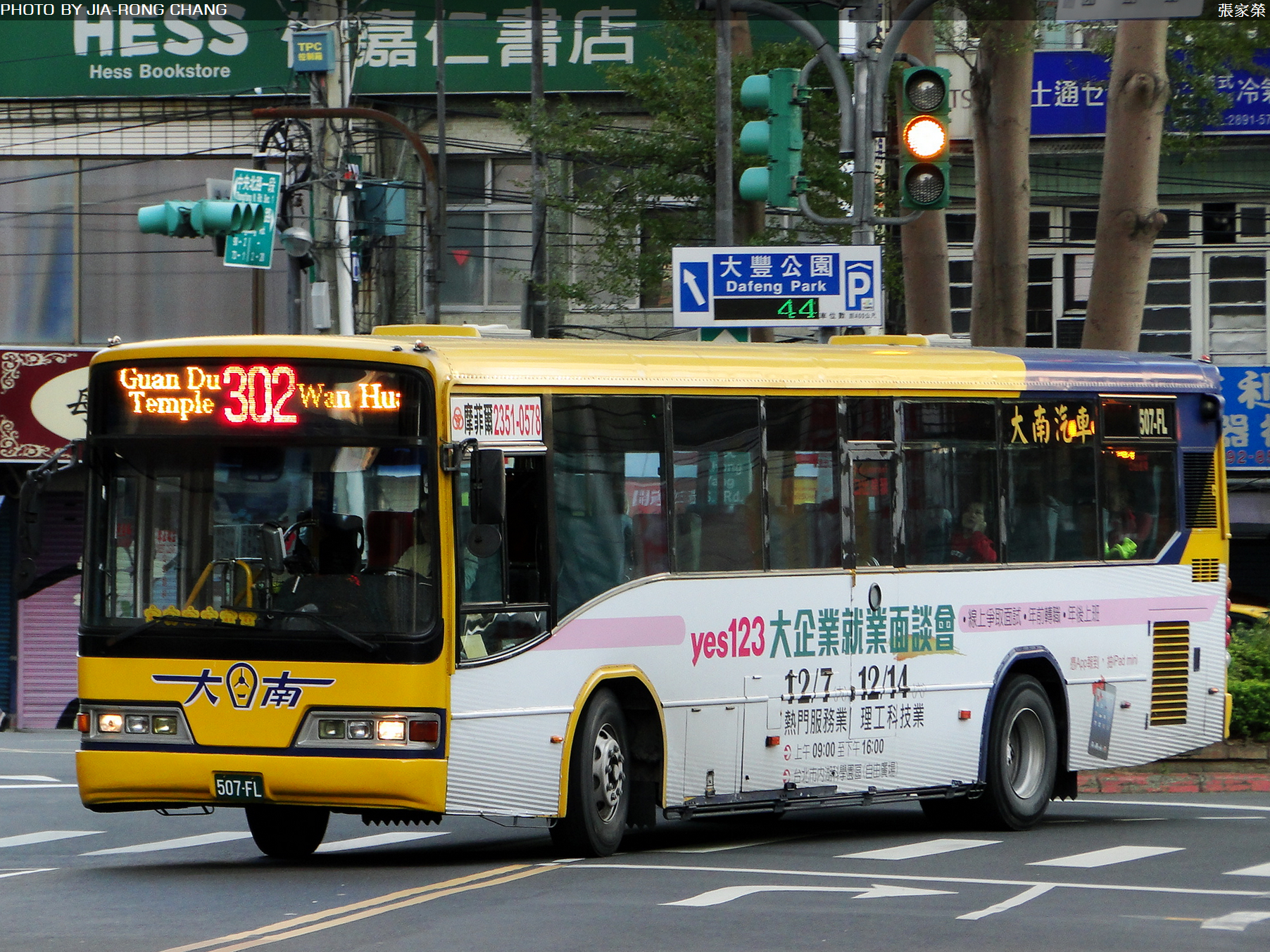 HINO - ERK1JRL - 507-FL